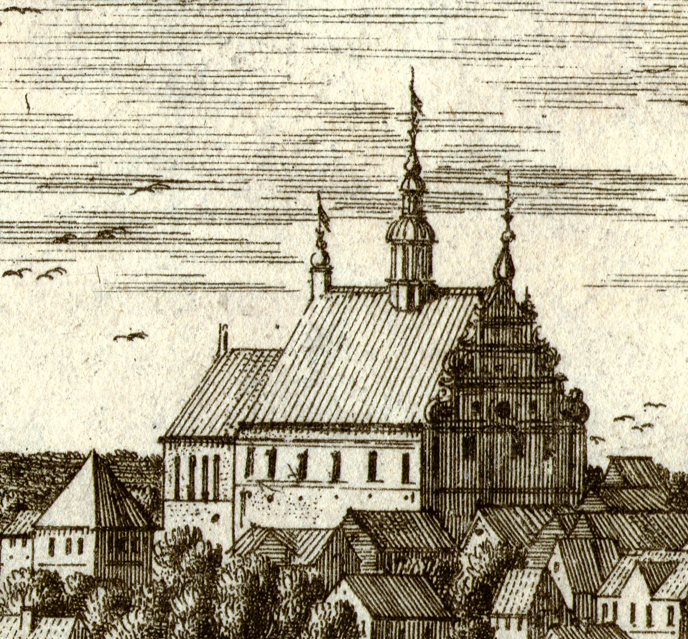 Kościół św. Jana Ewangelisty w Pińczowie w 1657 roku, miedzioryt wg rys. Erika Jönsona Dahlbergha.